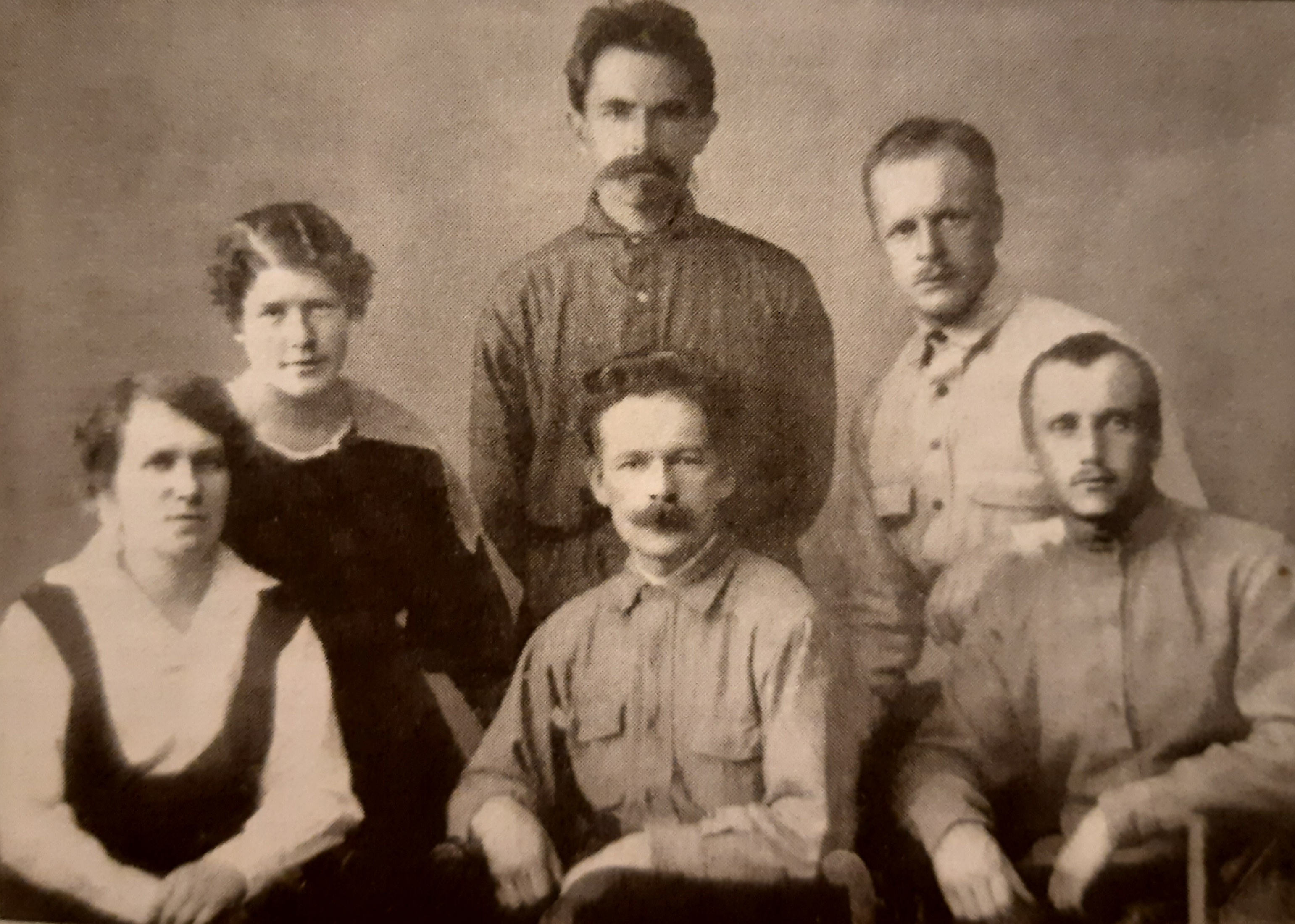 Сотрудники Чрезвычайной комиссии по борьбе с тифом, созданной в Новониколаевске в 1920 году.